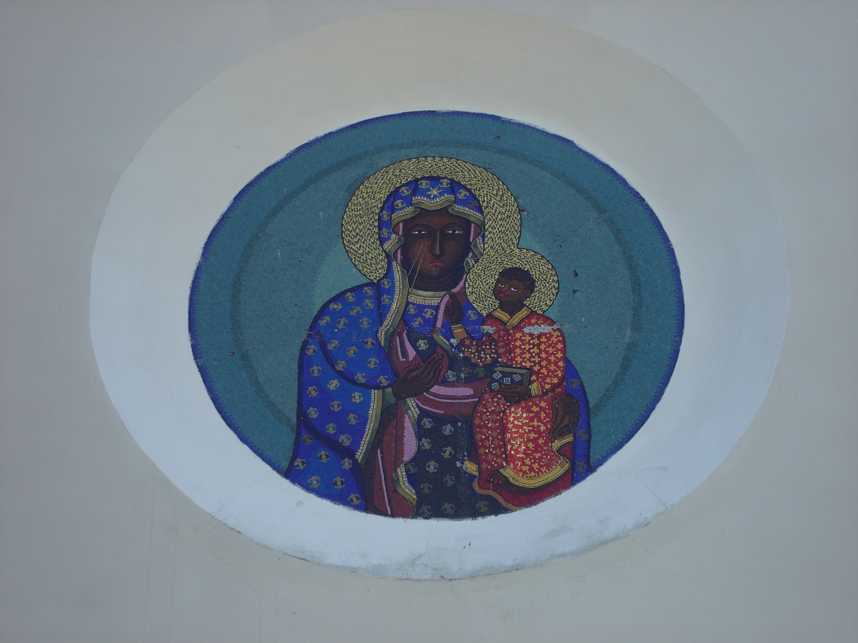 Kościół w Sieluniu. Obraz M.B.Częstochowskiej nad wejściem.